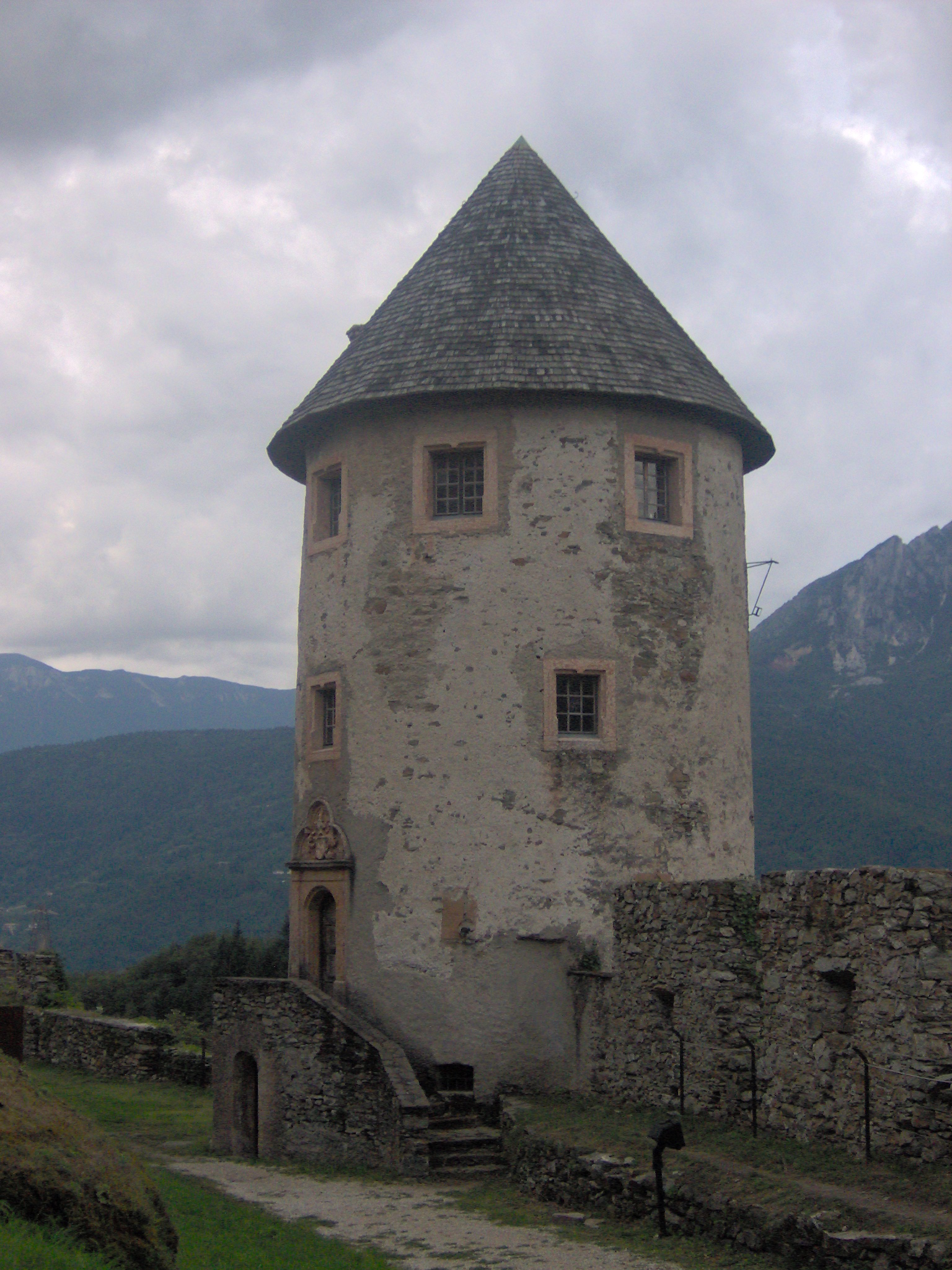 Image della provincia di Trento